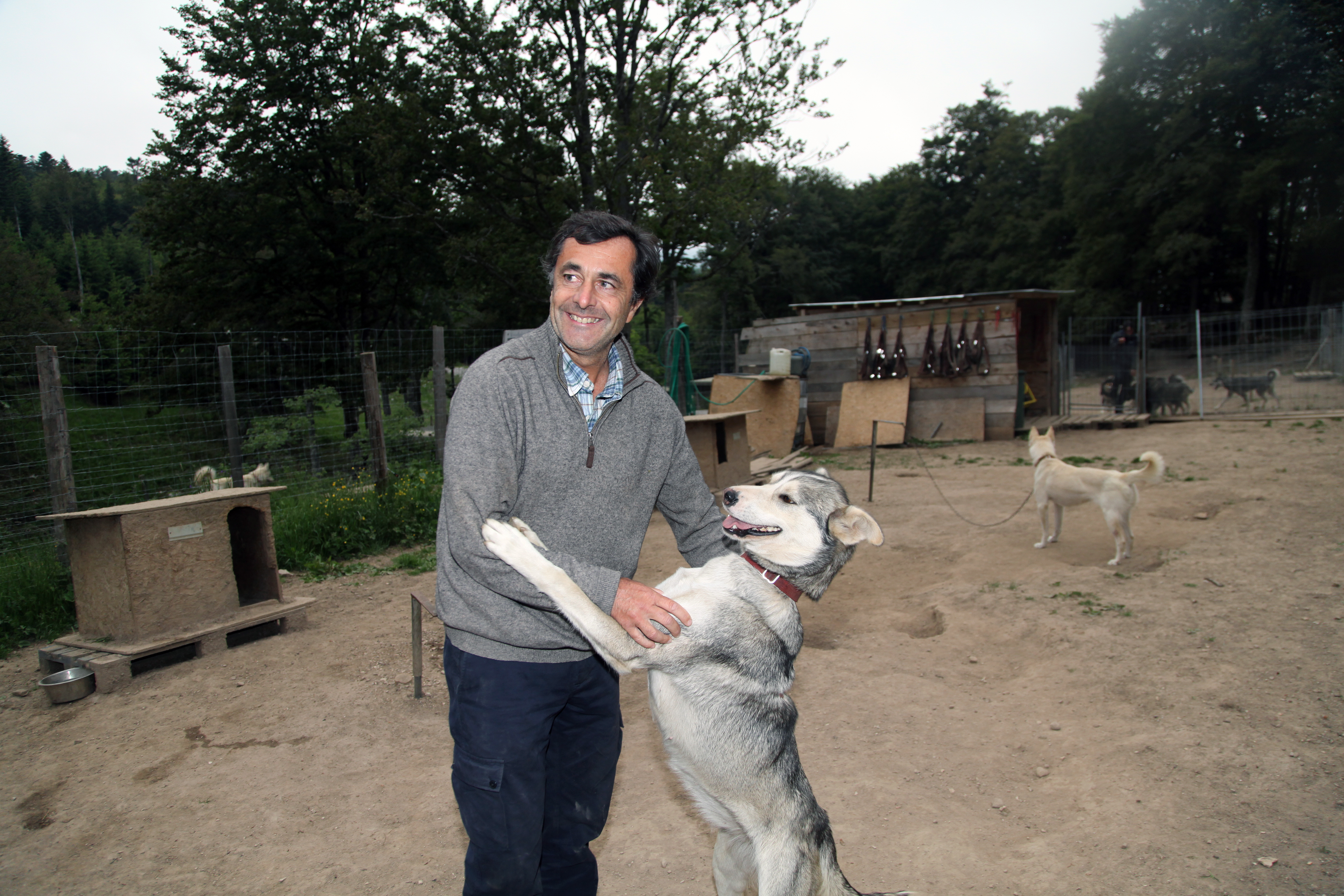 Photo du camp de Nicolas Vanier à Vassieux-en-Vercors